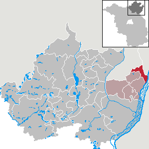 Mescherin in Brandenburg (Country) - District Uckermark